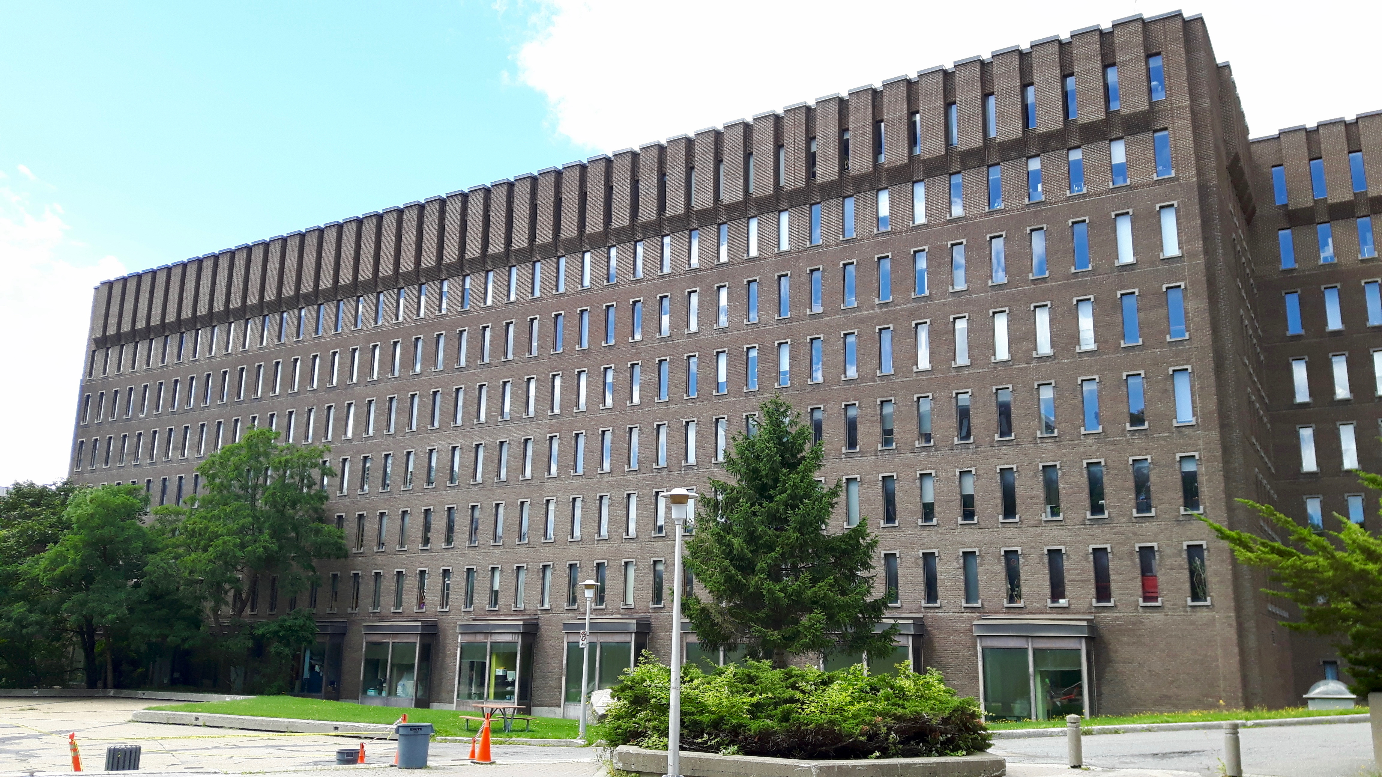 Pavillon Lionel-Groulx, Université de Montréal.